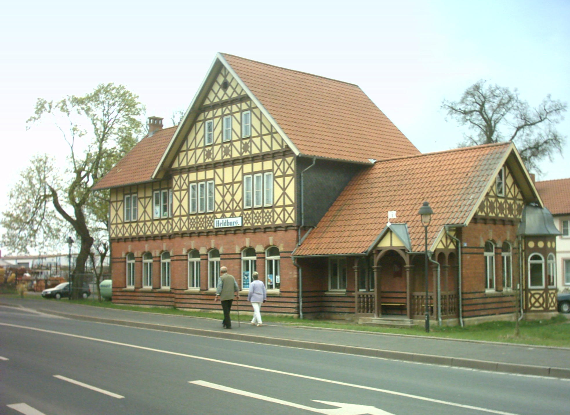 Heldburg Bahnhof Fotograf: presse03, selbst fotografiert, 2005 Lizenz: GNU-FDL Der ehemalige Bahnhof Heldburg mit herzoglichem Séparee, erbaut nach Plänen von Eduard Fritze 1888. Fahrbetrieb der Schmalspurbahn Hildburghausen - Heldburg - Lindenau/Friedrichshall bis 1946. In dem Fachwerkgebäude befindet sich jetzt die Gästeinformation, eine Bibliothek und das Heimatmuseum. Kategorie:Bild:Bahnhof